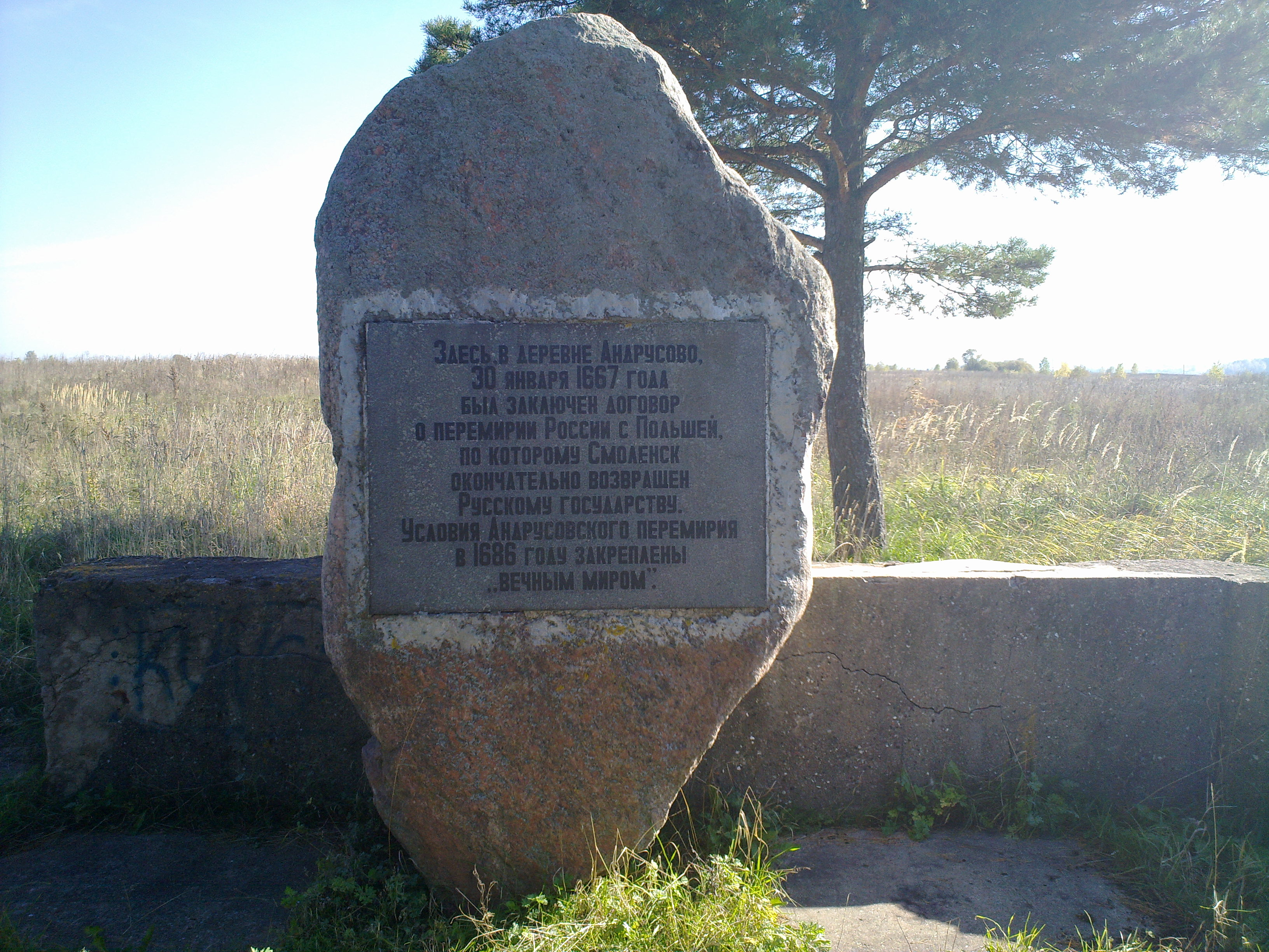 Памятник, установленный в честь Андрусовского перемирия